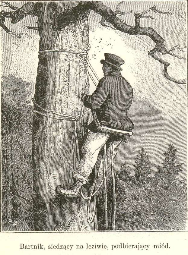 Bartnik siedzący na leziwie, podbierający miód